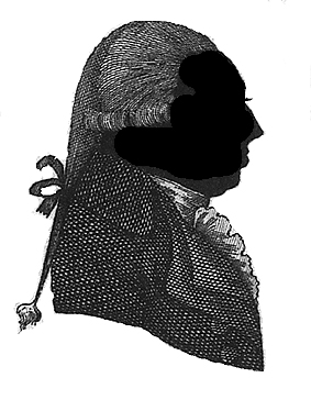 M. Siderius (1754-1829)